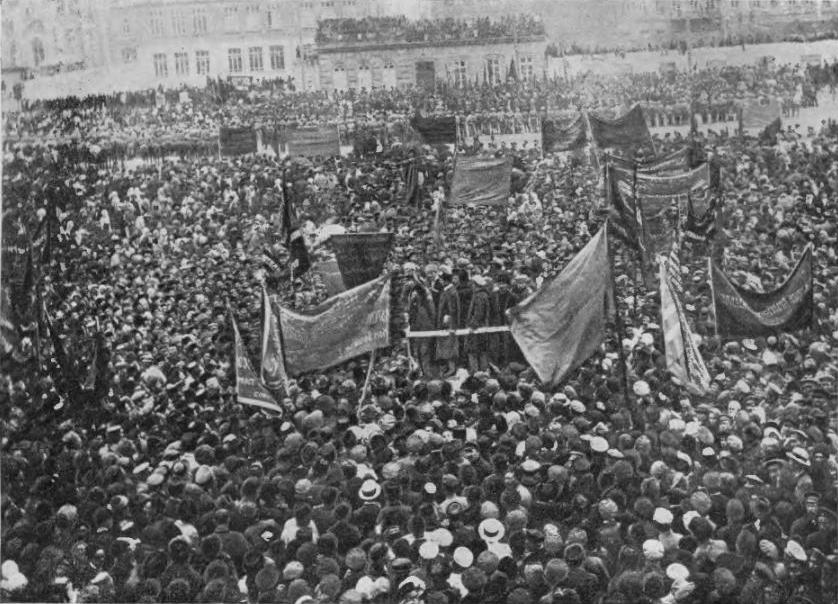 Митинг горожан и частей Красной Армии в Баку.